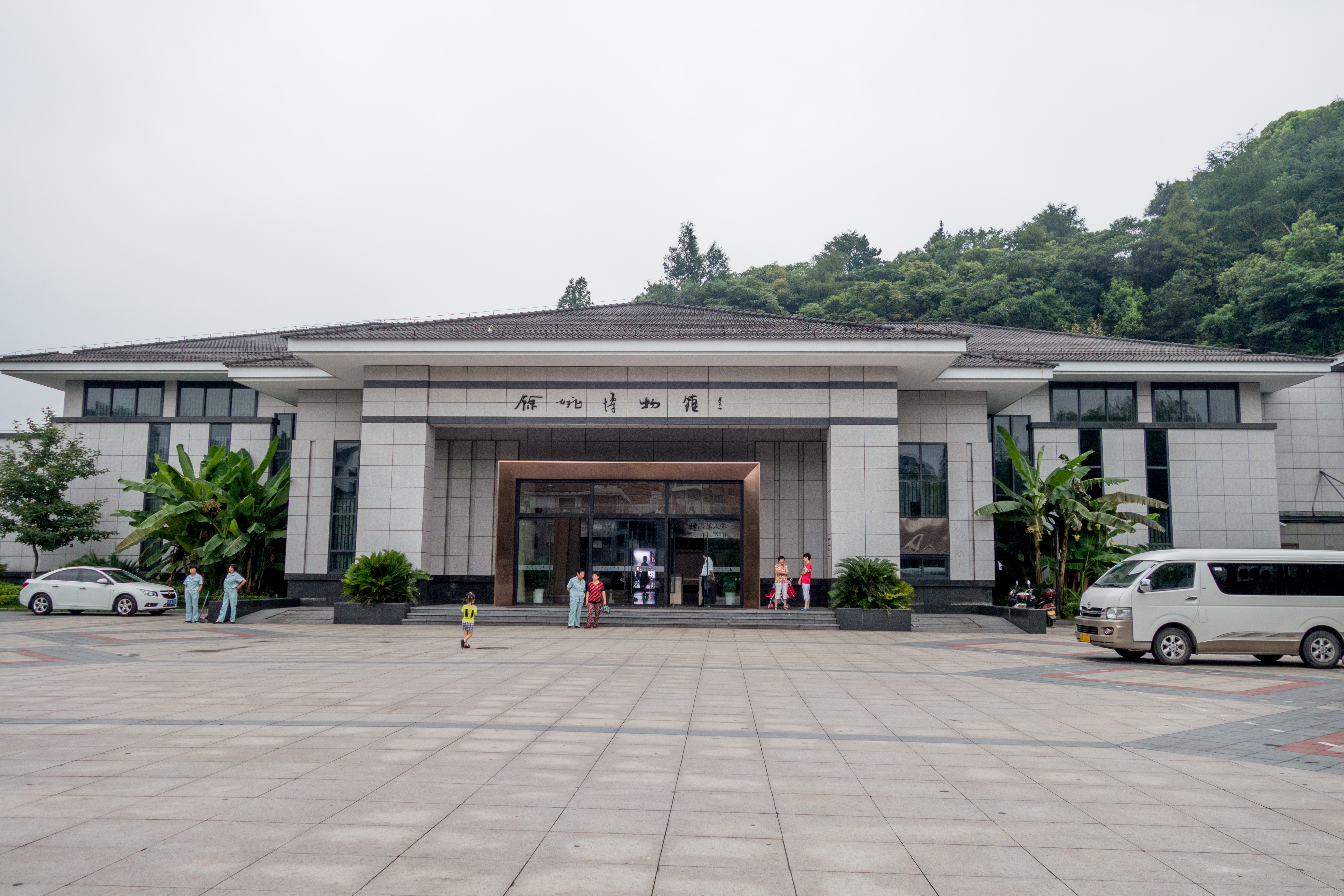 余姚博物馆